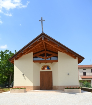 La Chiesa della Sacra Famiglia situata a Pianello